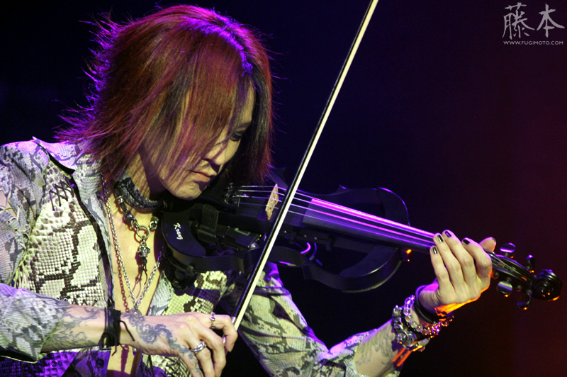 HSBC Brasil - São Paulo/SP - 11/09/2011